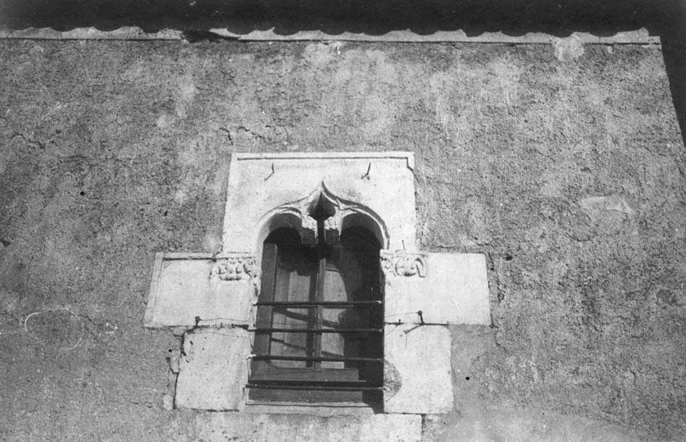 Detall d'una finestra de Ca n'Alsina o Cal Capataç. Jordi Audet i Viñals (Entre 1926 i 1927)